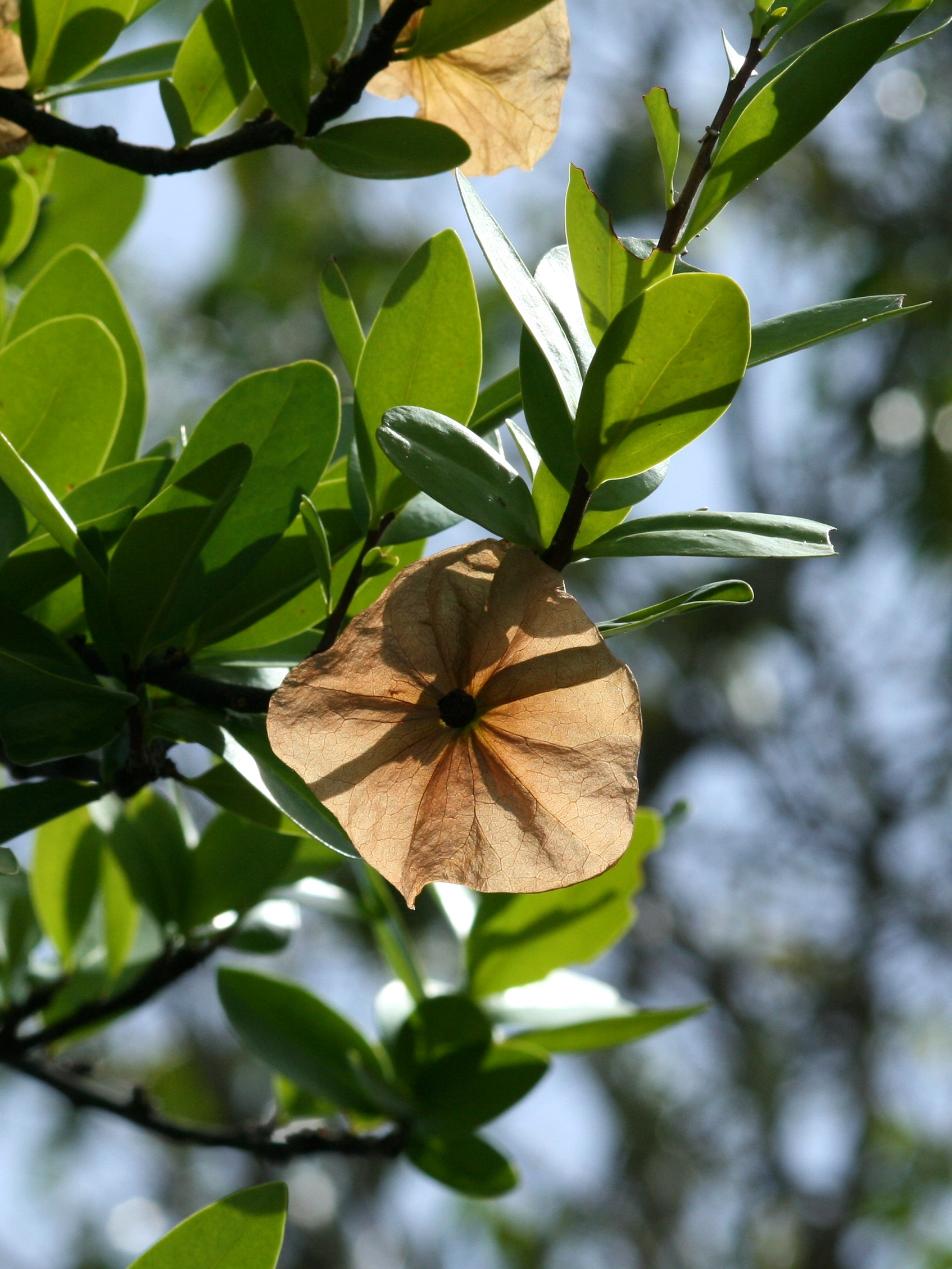 Chaunochiton angustifolium, Rio Ventuari, Venezuela